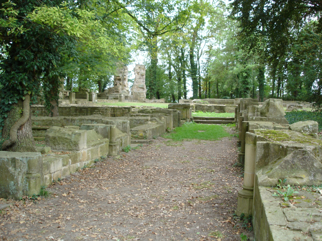 Klosterruine Disibodenberg: Teile eines Kreuzganges